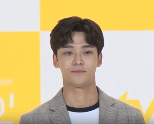 tvN 드라마 멈추고 싶은 순간 : 어바웃 타임 제작발표회 김로운